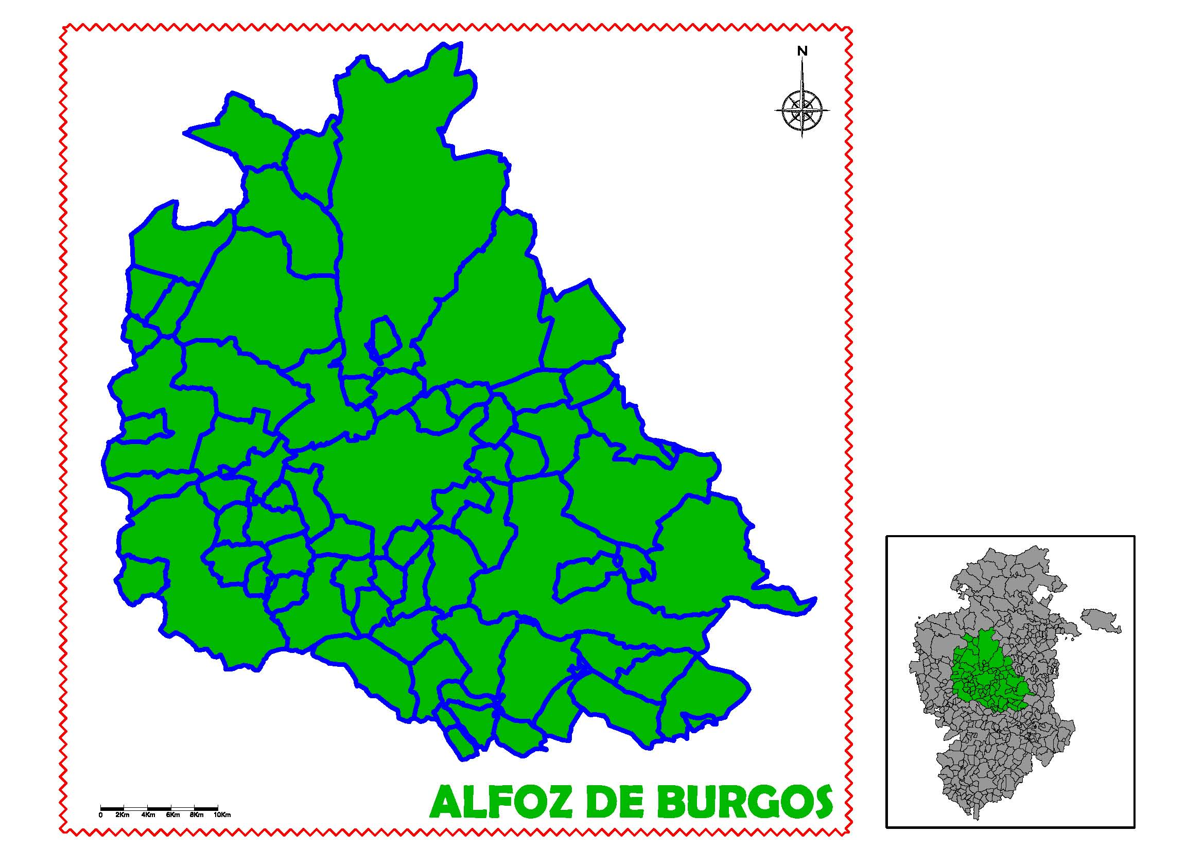 Situación comarca Alfoz de Burgos en la provincia de Burgos (España)